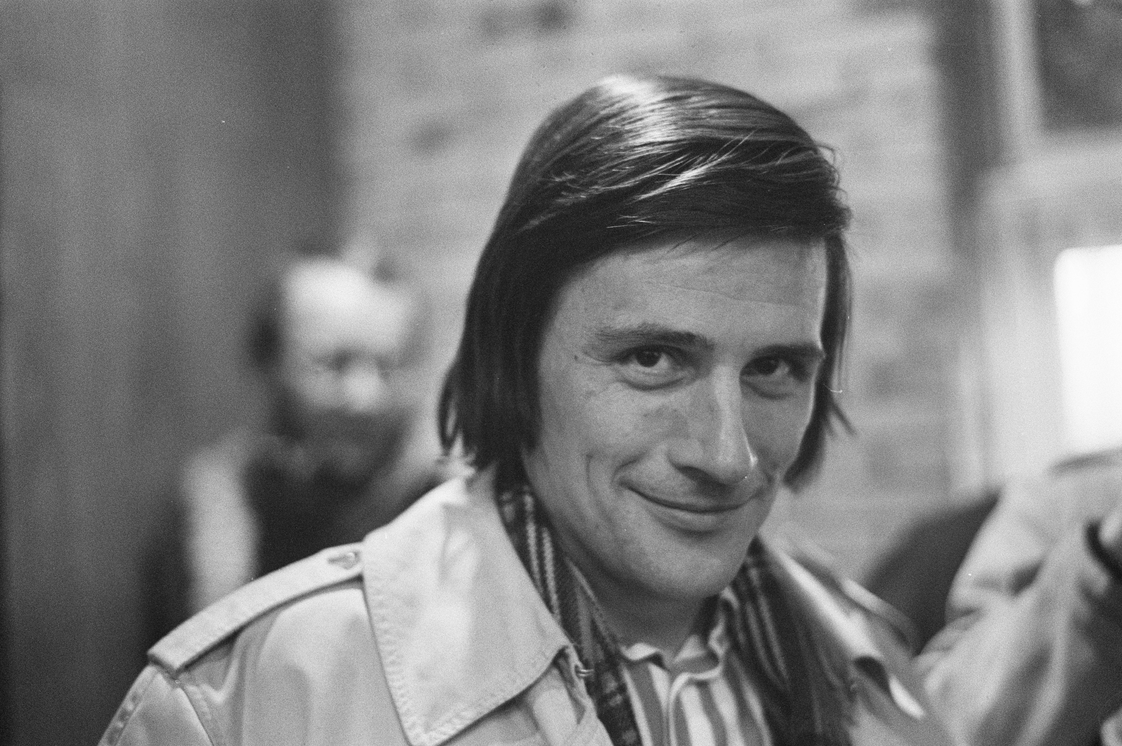 Collectie / Archief : Fotocollectie Anefo Reportage / Serie : [ onbekend ] Beschrijving : Henk Terlingen Datum : 7 april 1973 Trefwoorden : portretten Persoonsnaam : Terlingen, Henk Fotograaf : Peters, Hans / Anefo Auteursrechthebbende : Nationaal Archief Materiaalsoort : Negatief (zwart/wit) Nummer archiefinventaris : bekijk toegang 2.24.01.05 Bestanddeelnummer : 926-3282